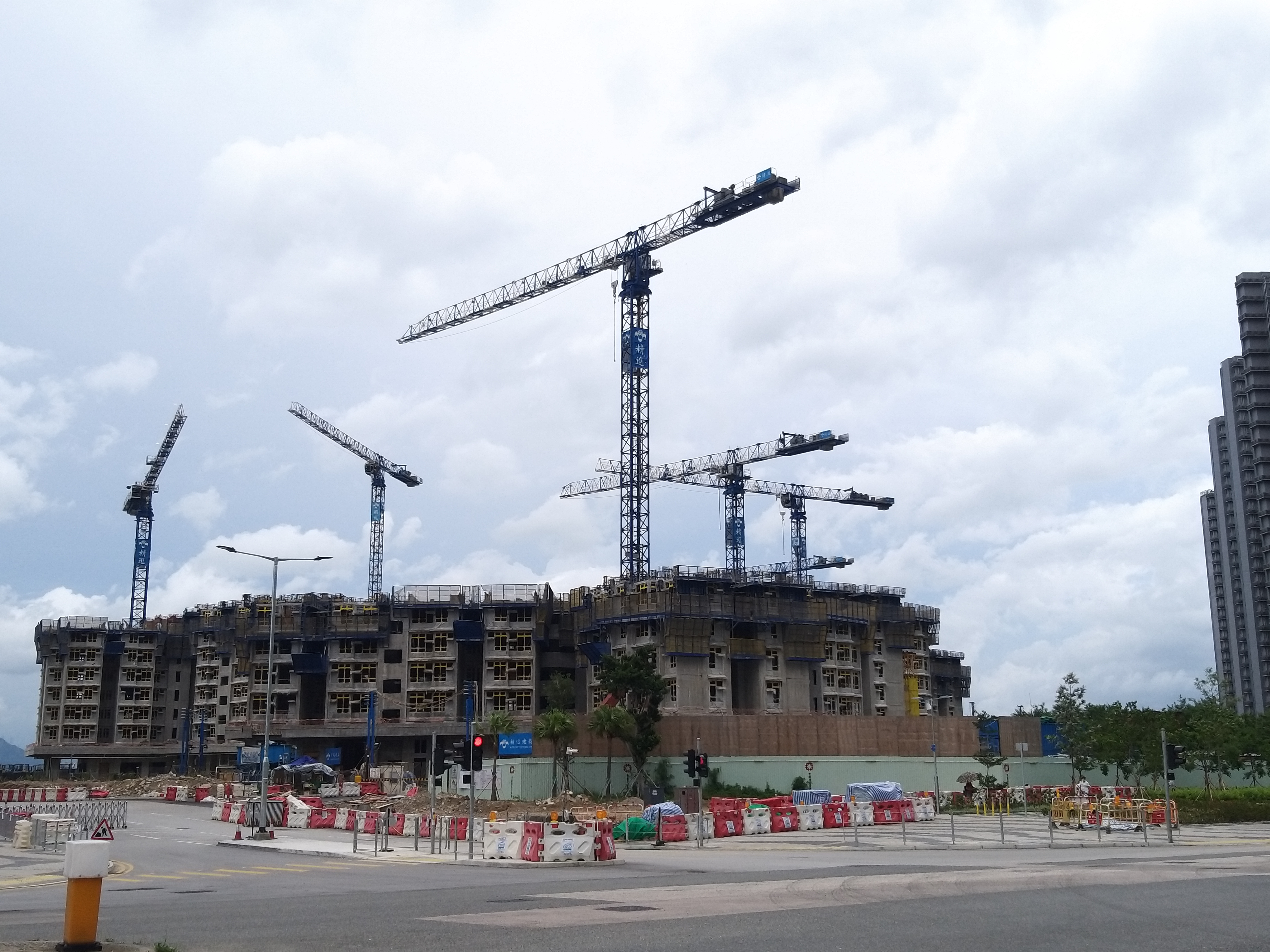 各座進度不一，將來可能分期銷售/入伙